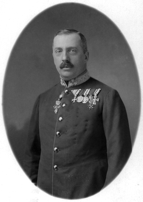 Peter Ferdinand, Erzherzog von Österreich-Toskana.